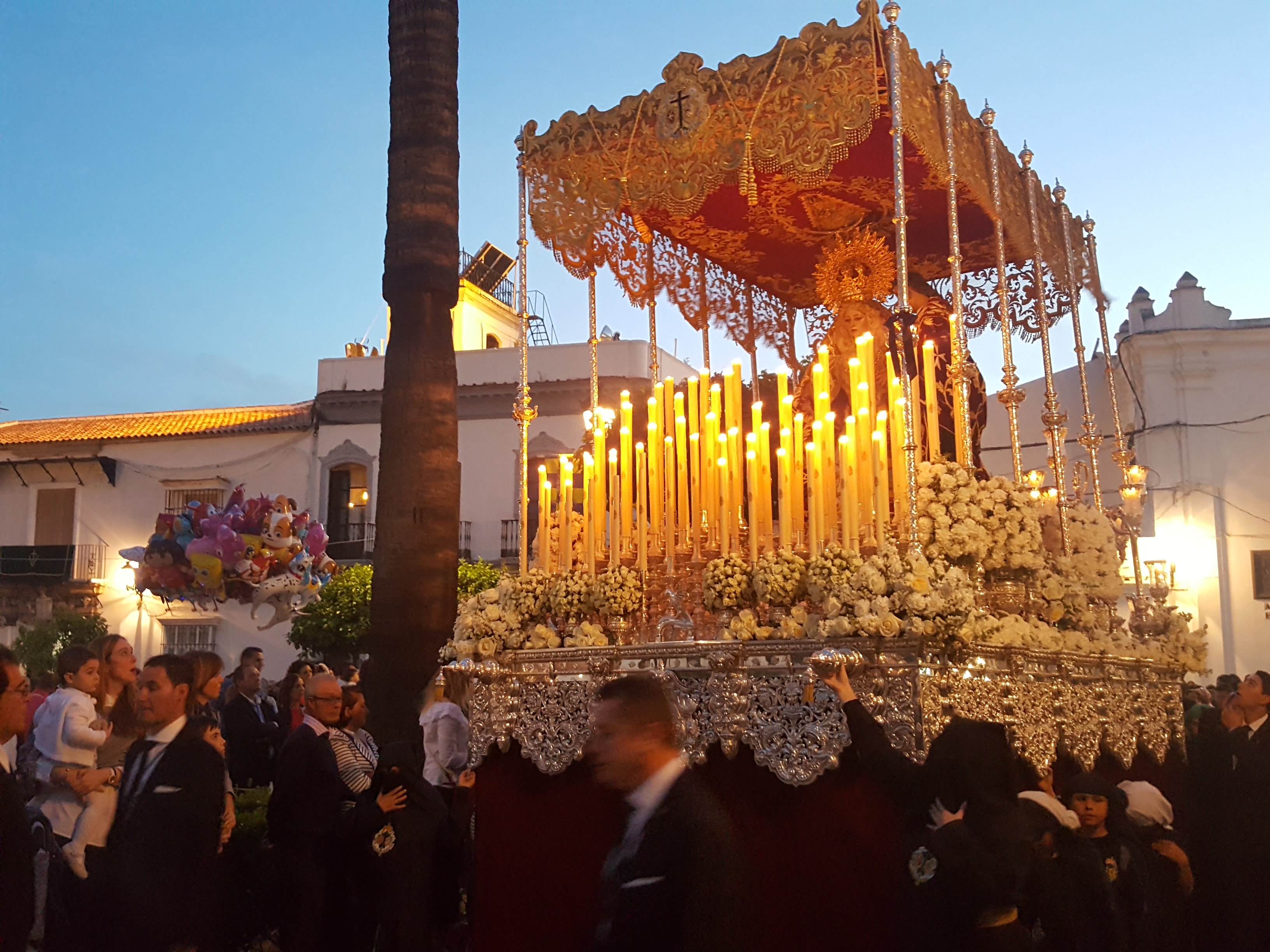 Hermandad del Cristo de la Victoria. Desfile procesional del Miércoles Santo. Vista de Nuestra Señora de la Paz por el casco urbano de Moguer.